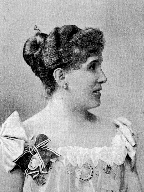 Emilie Welti-Herzog (1859 –1923) Opernsängerin, fotografiert von Paul Gericke, Berlin